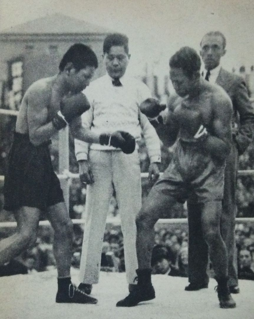 1933年のピストン堀口（左）対ヤング・トミー（右）戦